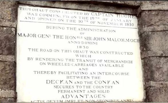 अमृतांजन पूल